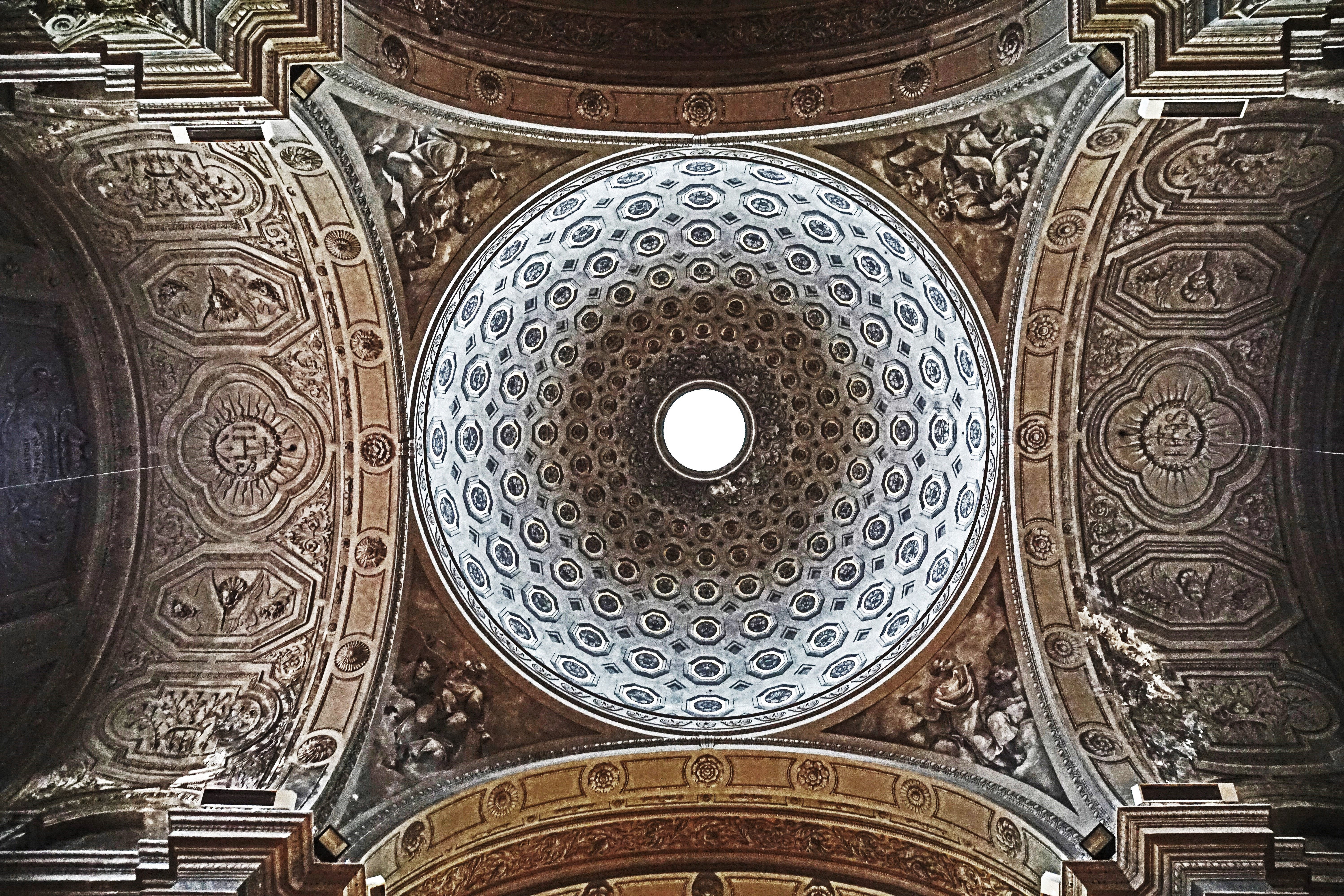 Blick in die Kuppel der Kirche S. Maria Maggiore in Triest